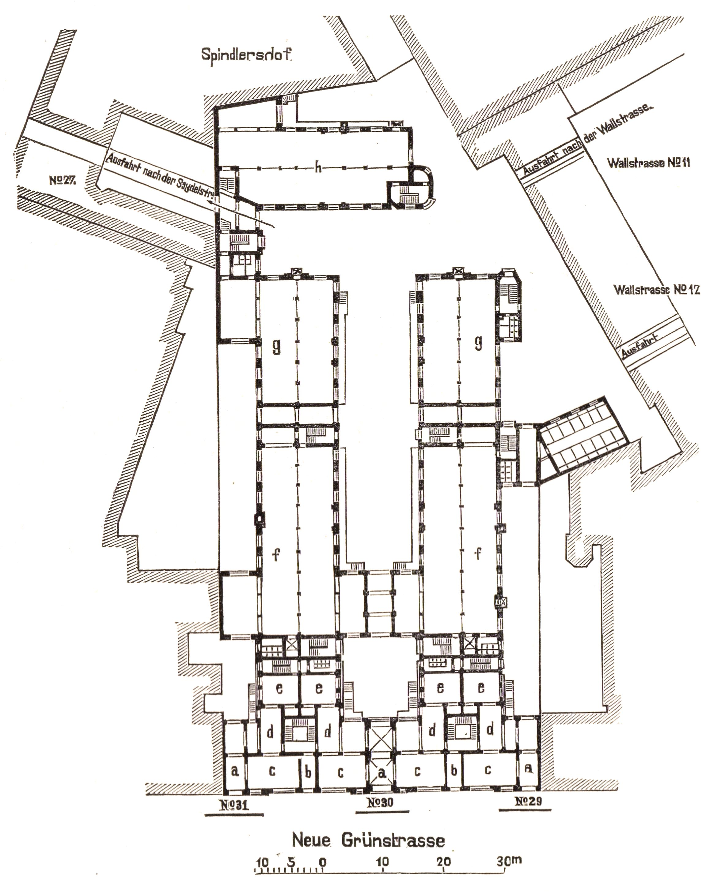 Berlin - Geschäftshaus Spindlershof, Lageplan 1896